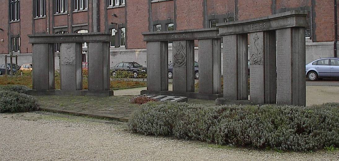 Drie maal drie pijlers met de namen van 340 gesneuvelden